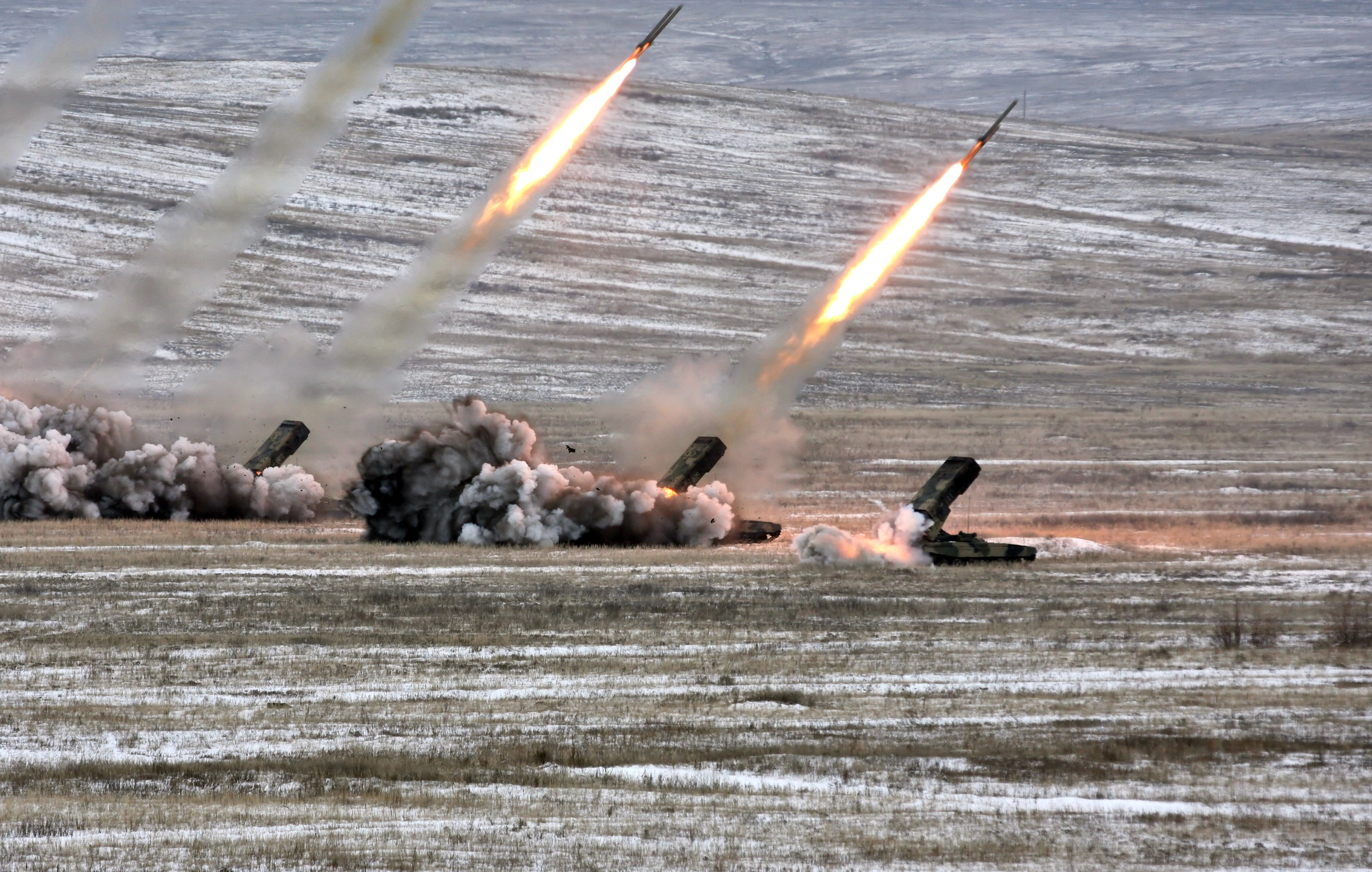 Стрельбы тяжелой огнеметной роты ТОС-1А (Heavy flamethrower system TOS-1A firing)